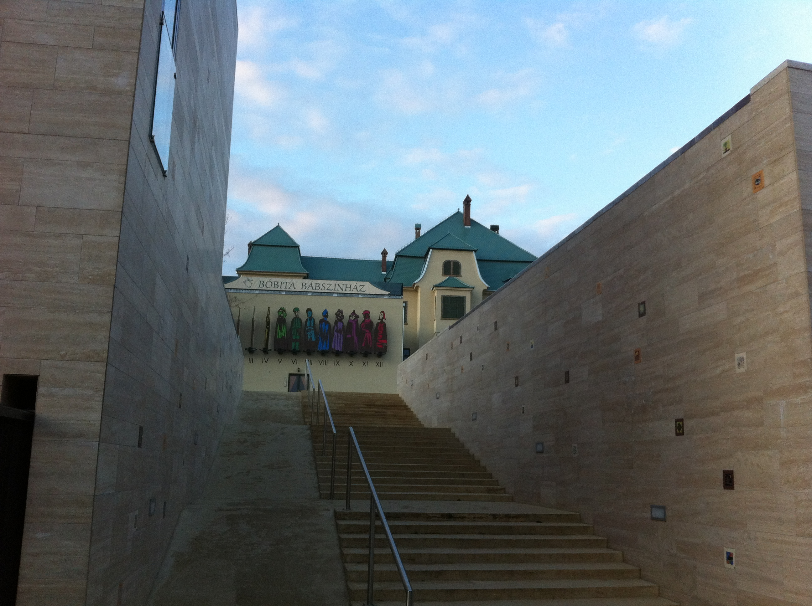 Feljárat a Bóbita Bábszínházhoz a Zsolnay negyedben (Pécs, Magyarország)